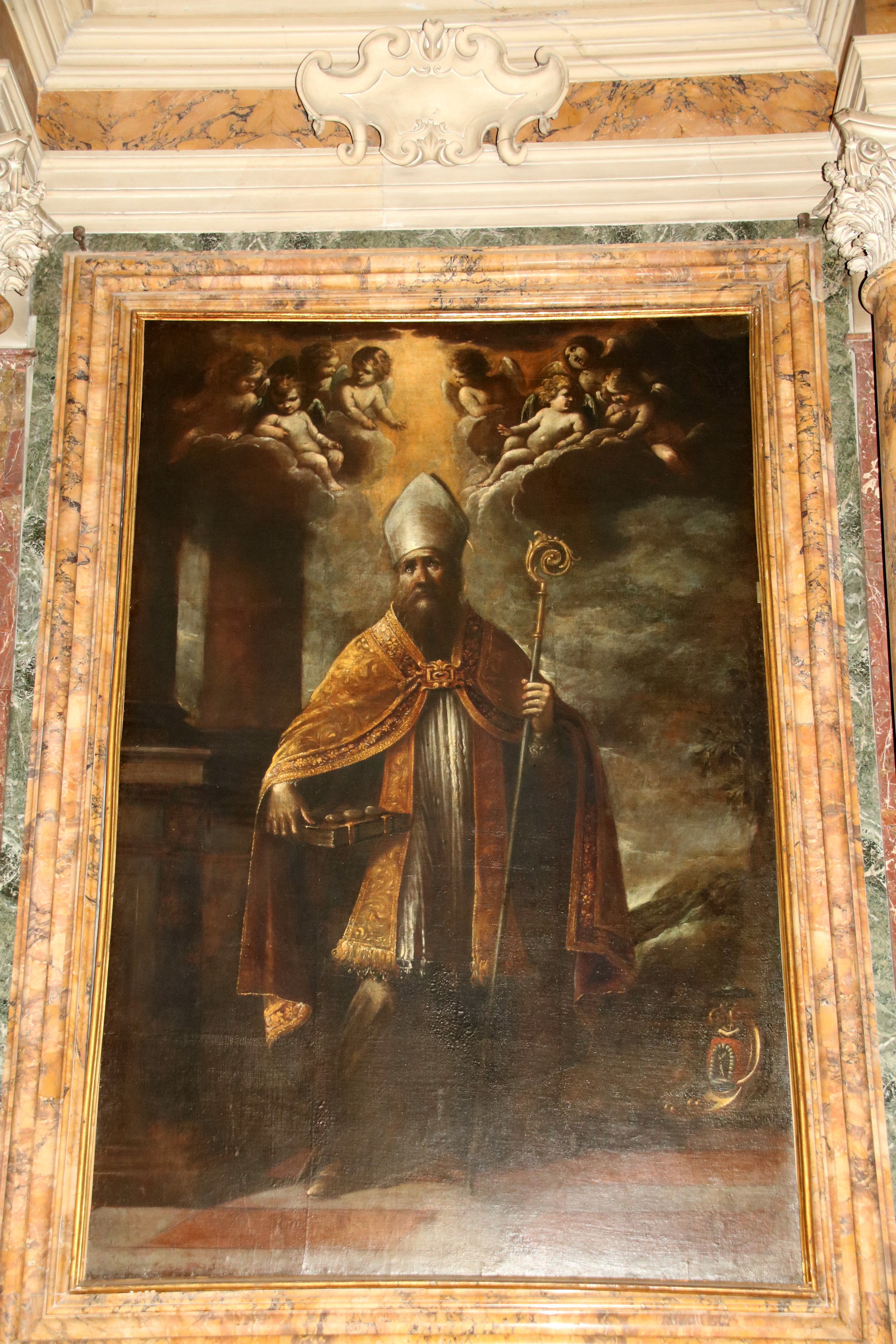 Concattedrale di Santa Maria Assunta (Cagli)